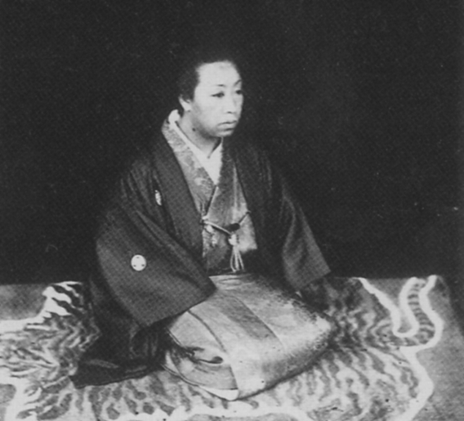 天璋院または篤姫。Tensyoin AKA Atsu-Hime. 第13代将軍徳川家定御台所。